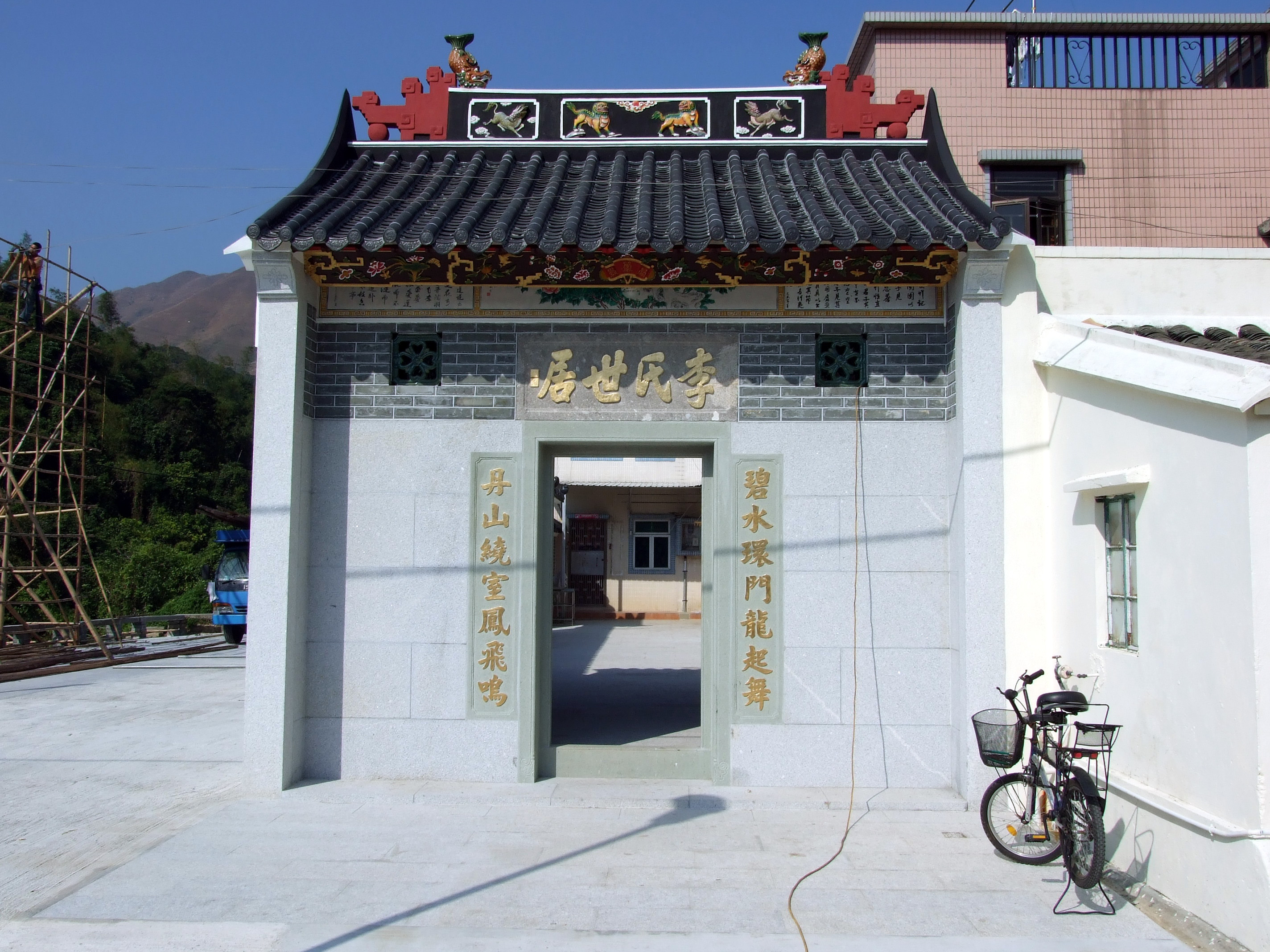 中文（香港）: 上禾坑李氏宗祠